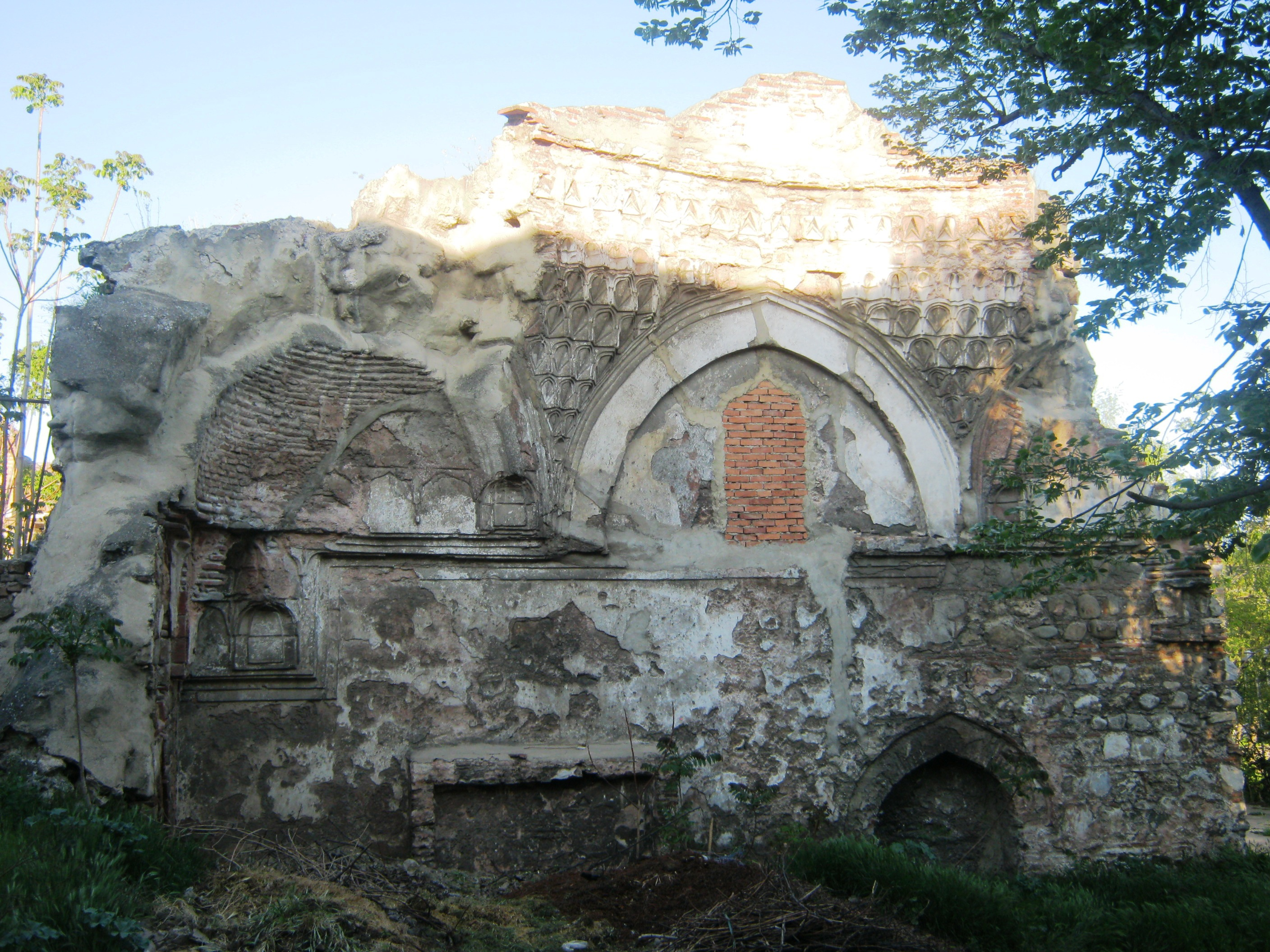 Остатоци од Ѓулчилер (Шенѓул) амам